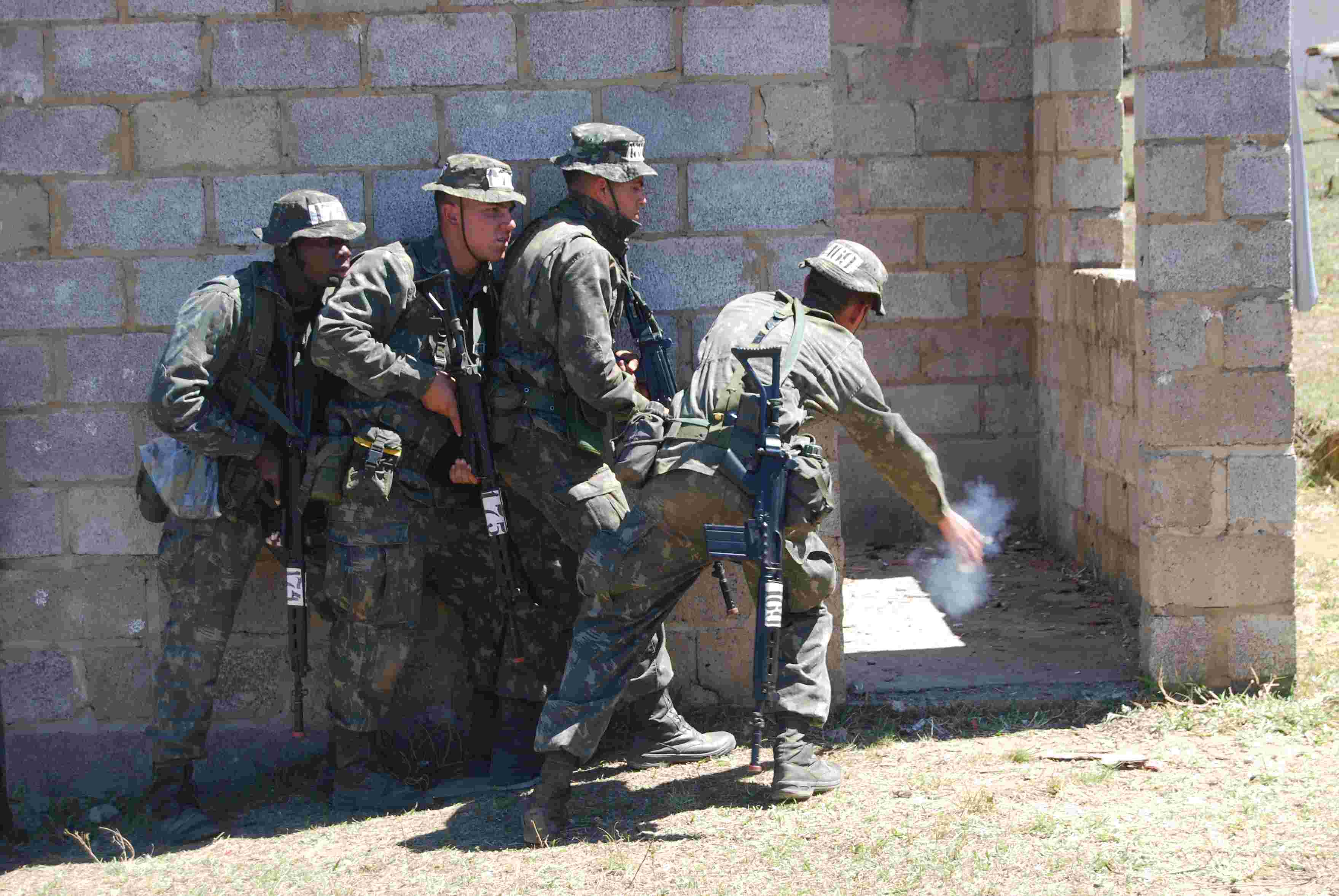 SIESP ESA